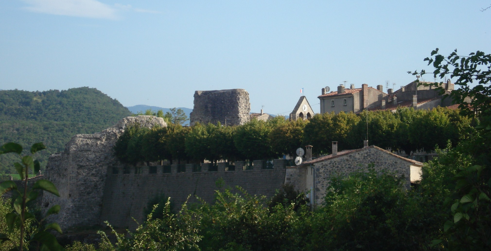 vue de Beaufort sur Gervanne dans la Drôme